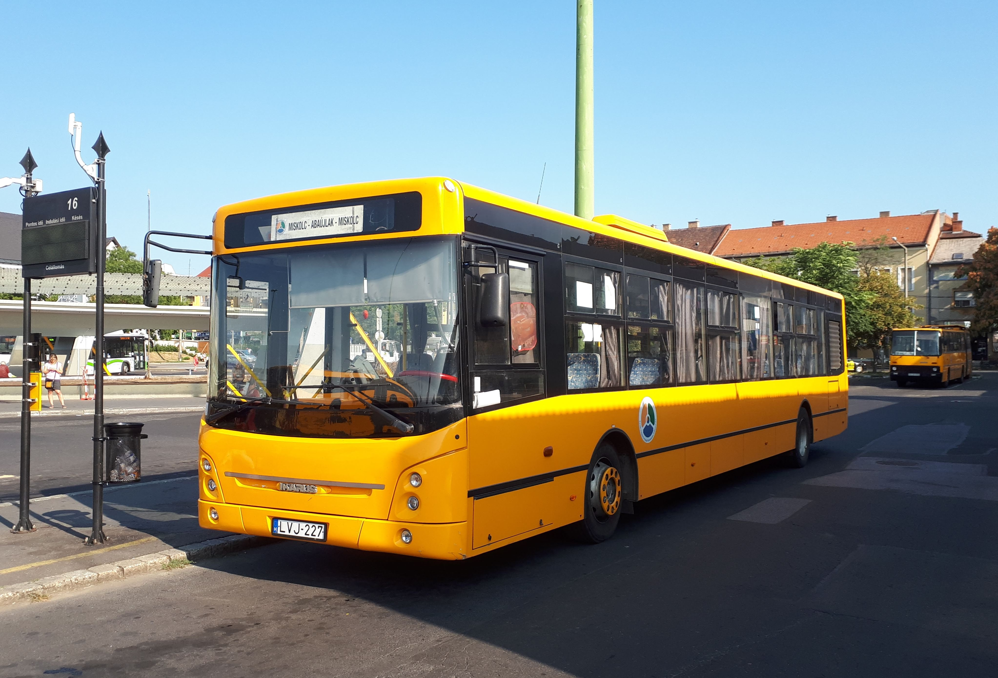 Az ÉMKK LVJ-227 rendszámú Ikarus-ARC E134 típusú busza Miskolcon, a 3717-es helyközi járaton.